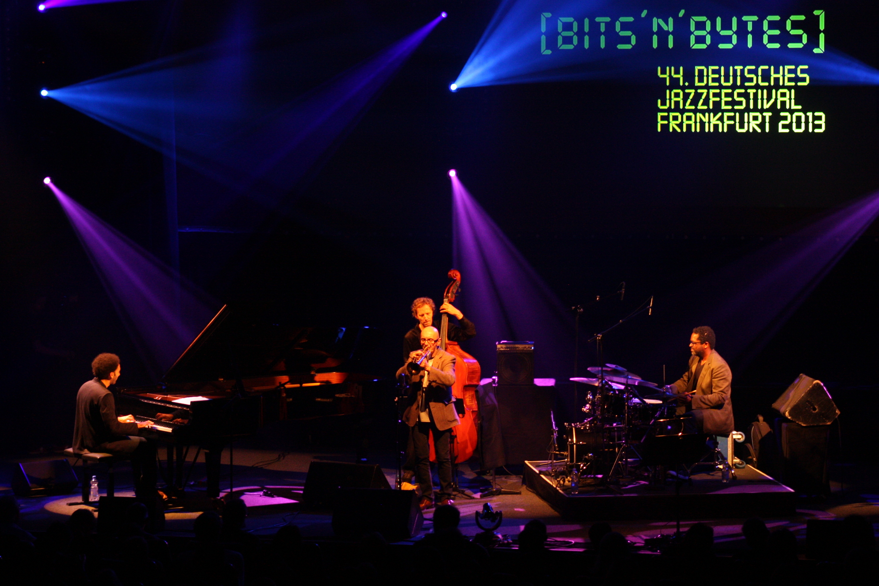 44. Deutsches Jazzfestival Frankfurt 2013: Tomasz Stanko New York Quartet mit Ben Street, David Vireilles, Gerald Cleaver, Tomasz Stanko